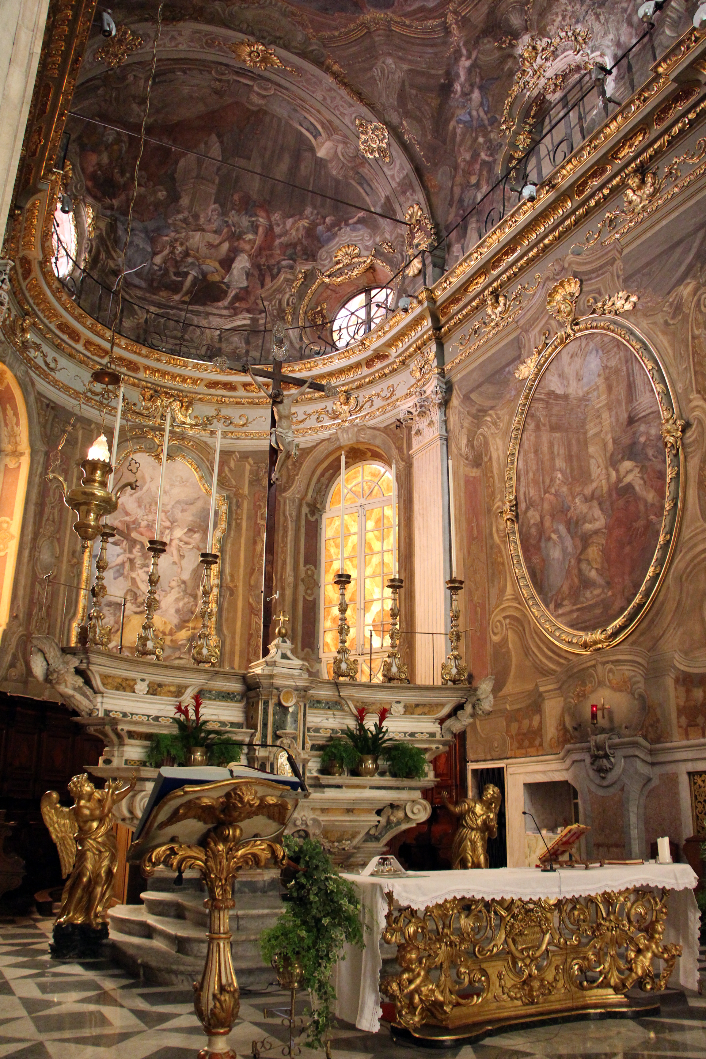 Santa Maria Maddalena (Genova) The making of this document was supported by Wikimedia CH. (Submit your project!) For all the files concerned, please see the category Supported by Wikimedia CH.